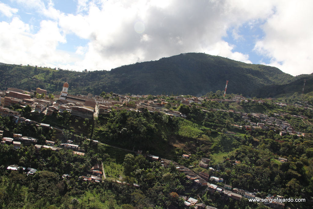 Vista panorámica de Ituango.